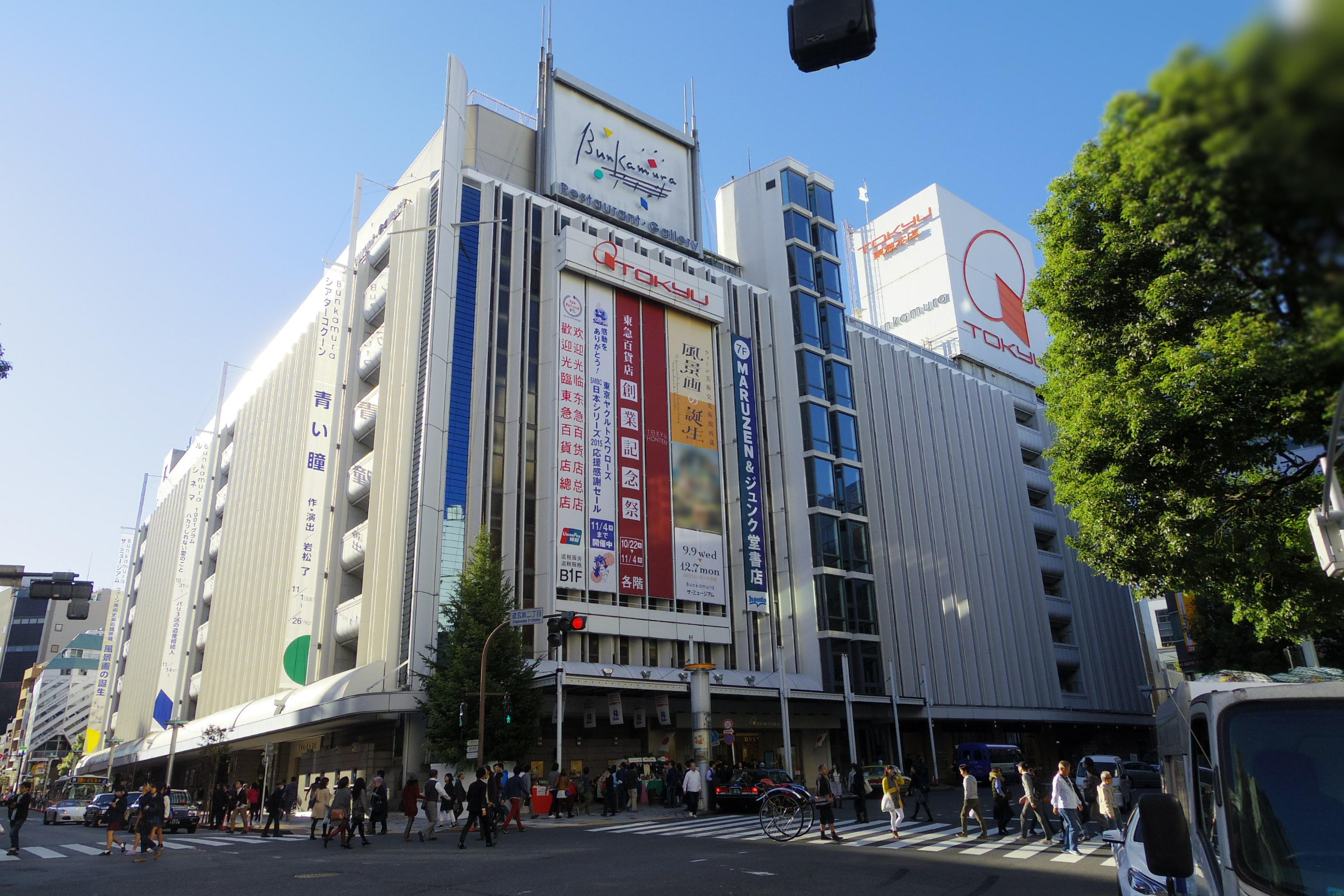 東急百貨店本店と文化施設Bunkamura。 2015年11月3日、本店前にて撮影したものを後日、Paintgraphic3にて加工（垂れ幕部分（美術展開催のため絵画部分）のモザイク処理など）。